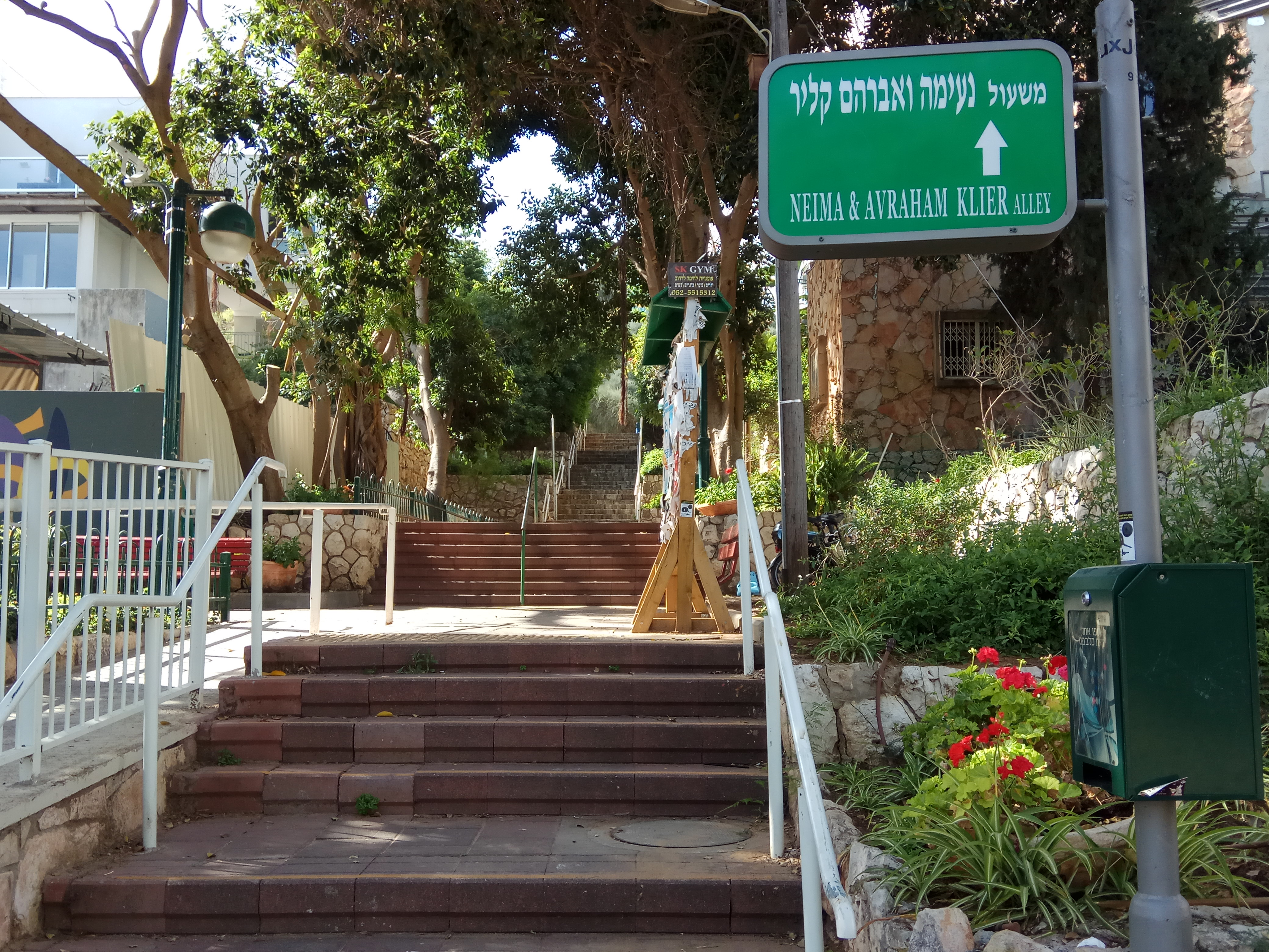 משעול נעימה ואברהם קליר ברמת גן